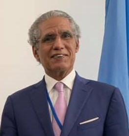 Mohamed Salem Ould Salem, Außenminister derSahara